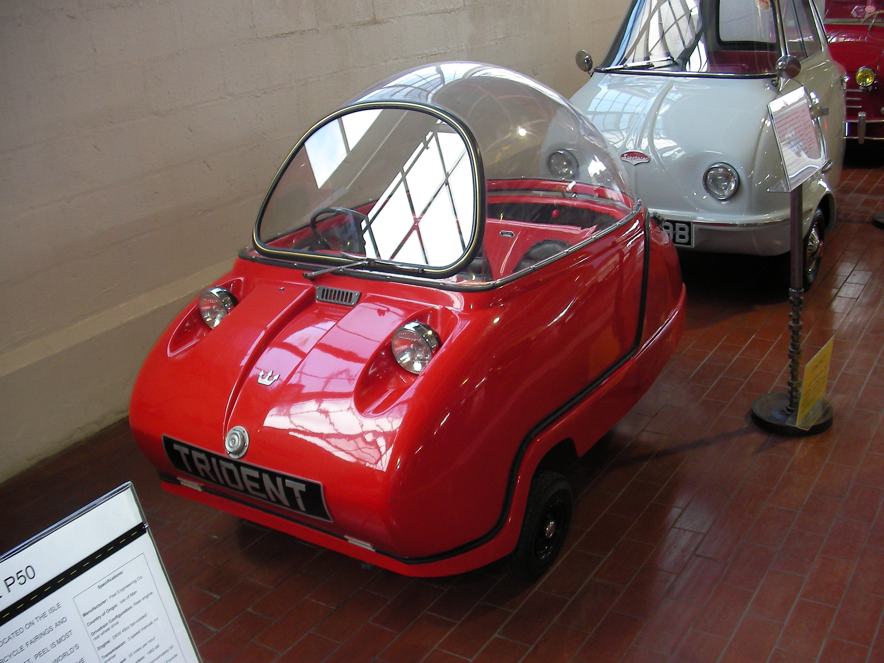 Peel TridentPeel Trident